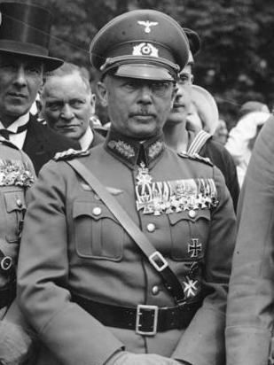 1934 am Ehrenmal Unter den Linden, Berlin